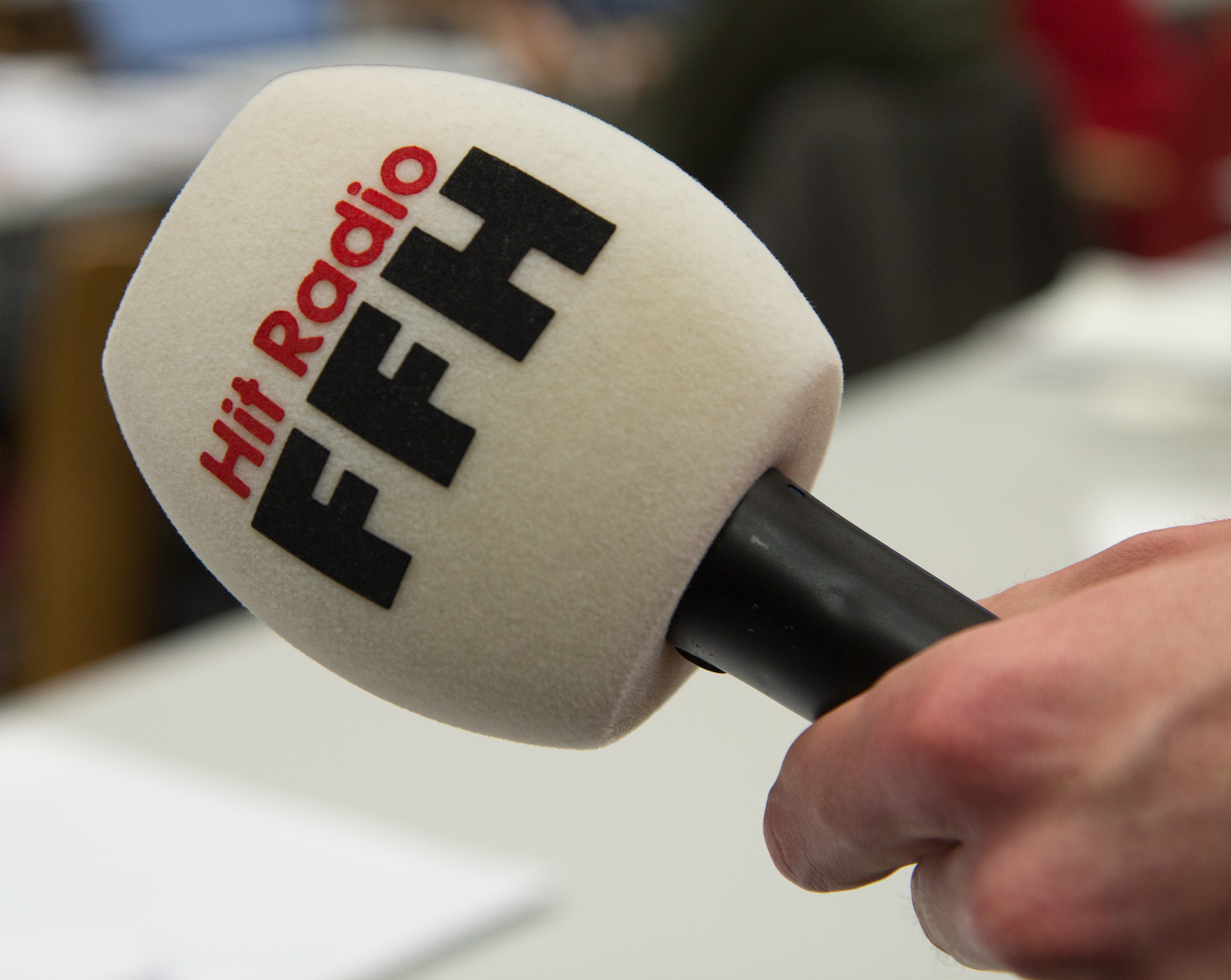 Internationales Festhallen Reitturnier 2017 in Frankfurt.